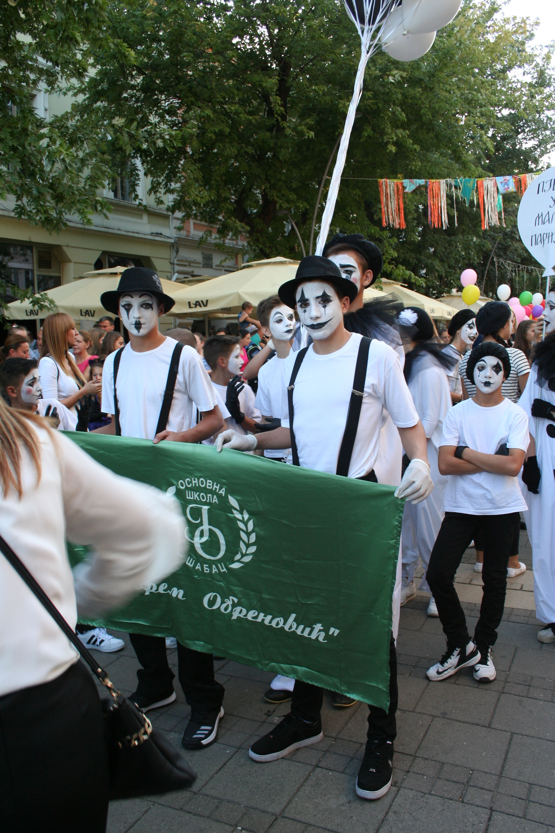 Šabac, Čivijada i dečiji karneval